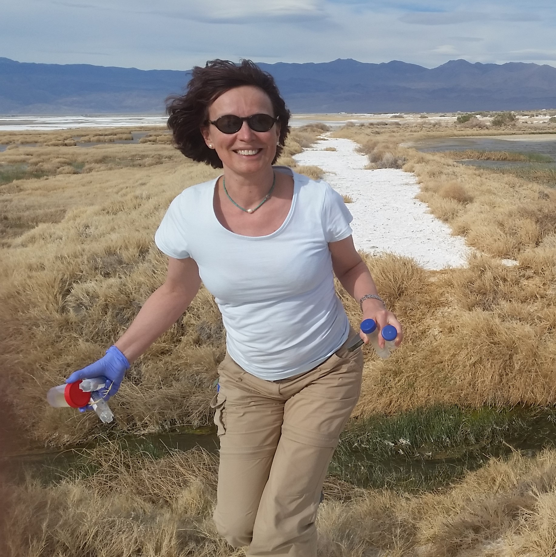 Iwona Jasser pobiera próby wody z Lake Owens, Kalifornia